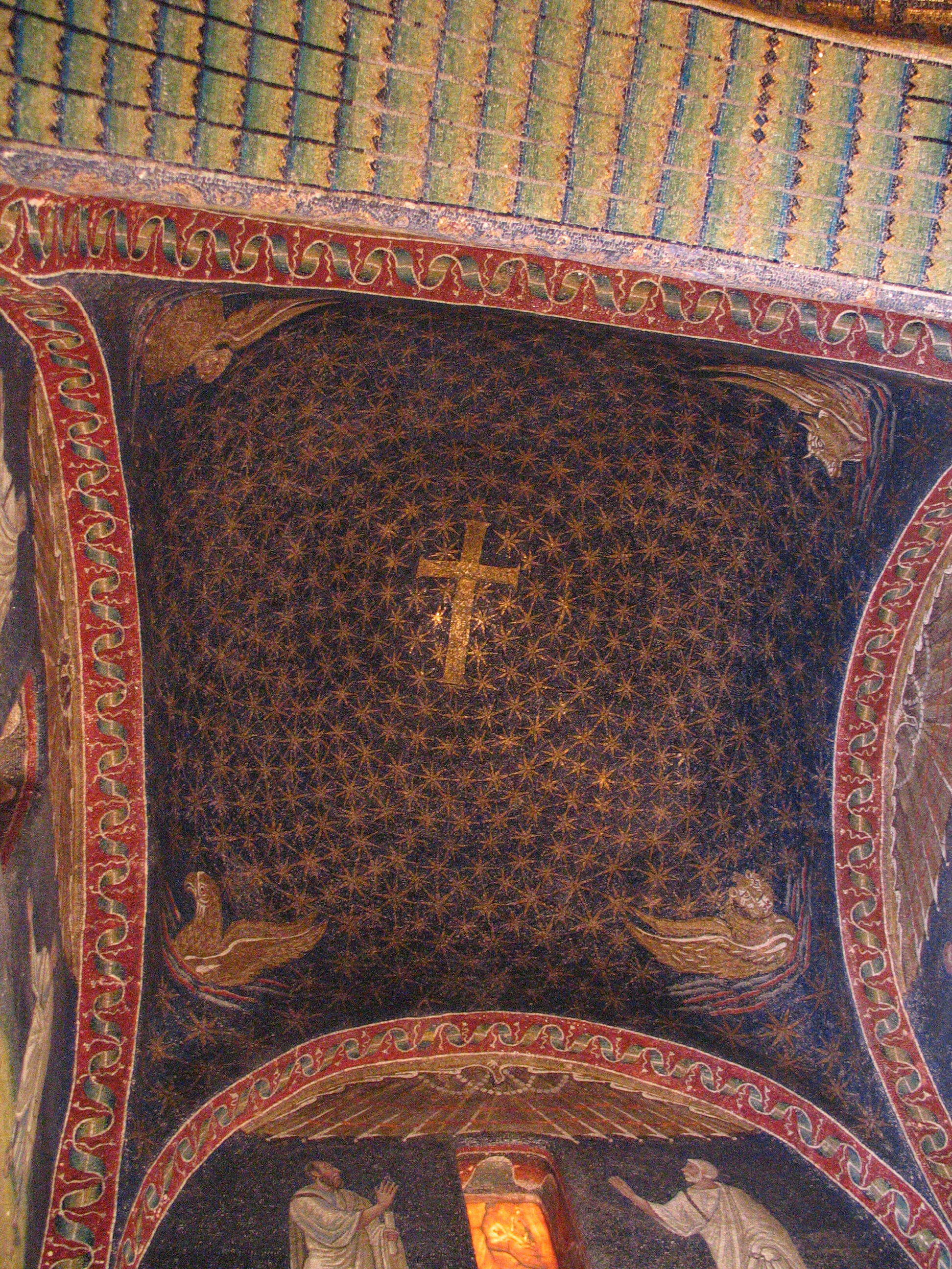 Mausoleum der Galla Placidia in Ravenna, Italien. Deckenmosaik